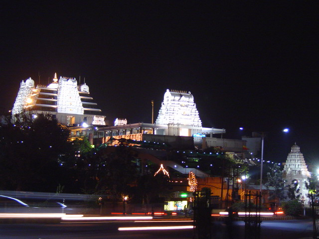 ബാംഗ്ലൂരിലെ ഇസ്കോൺ അമ്പലം. ഇസ്കോൺ എന്നത് ഇന്റർ നാഷണൽ സൊസൈറ്റി ഓഫ് കൃഷ്ണ കോൺഷ്യസ്നസ് എന്നതിന്റെ ചുരുക്കപ്പേരാണ്.